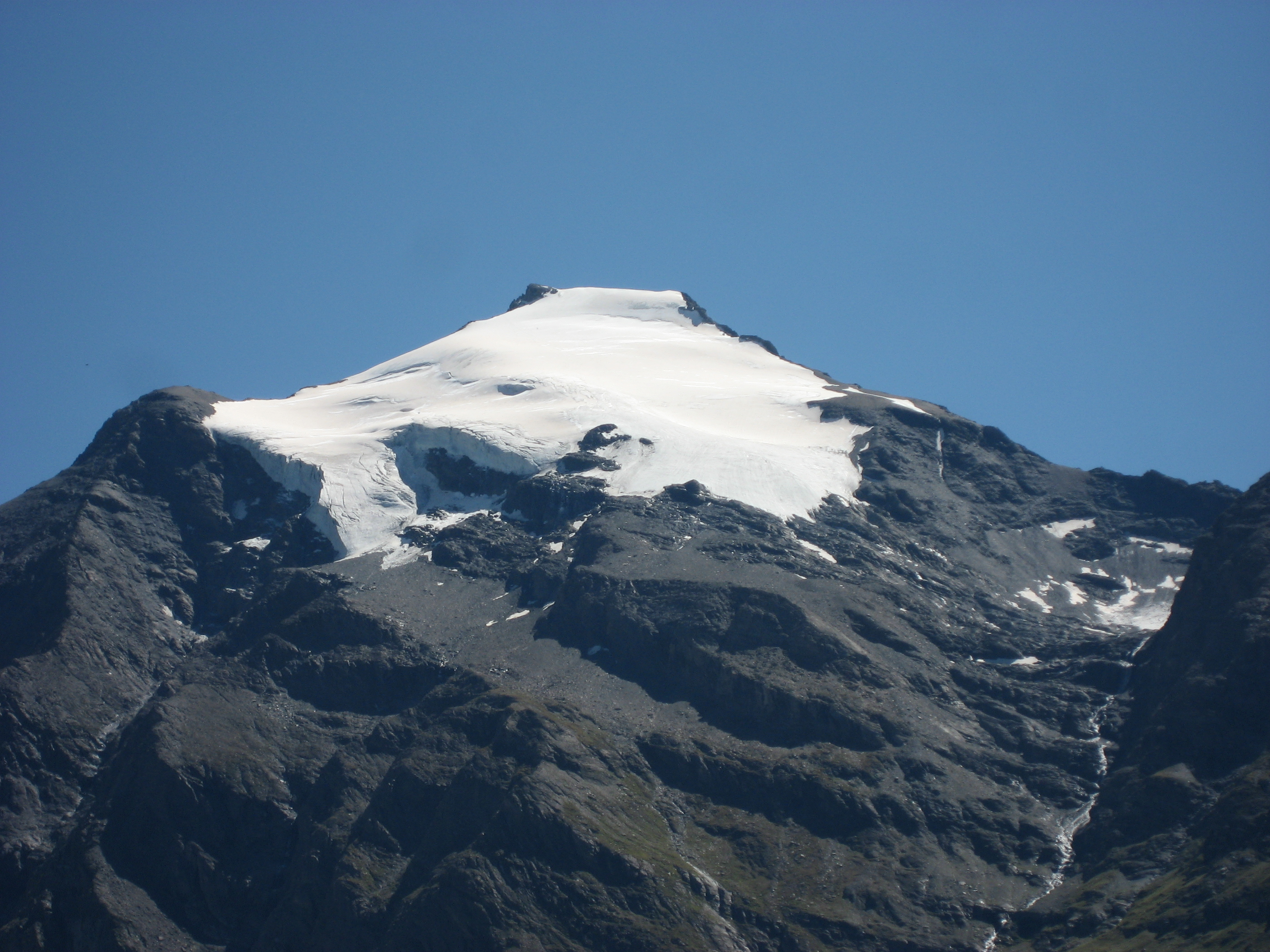 Pointe de Charbonnel taken from the parking of le Villaron in the Vallée de la Maurienne Pointe de Charbonnel Position: Map: 45° 16' 51" N 7° 3' 20" E Camera Position